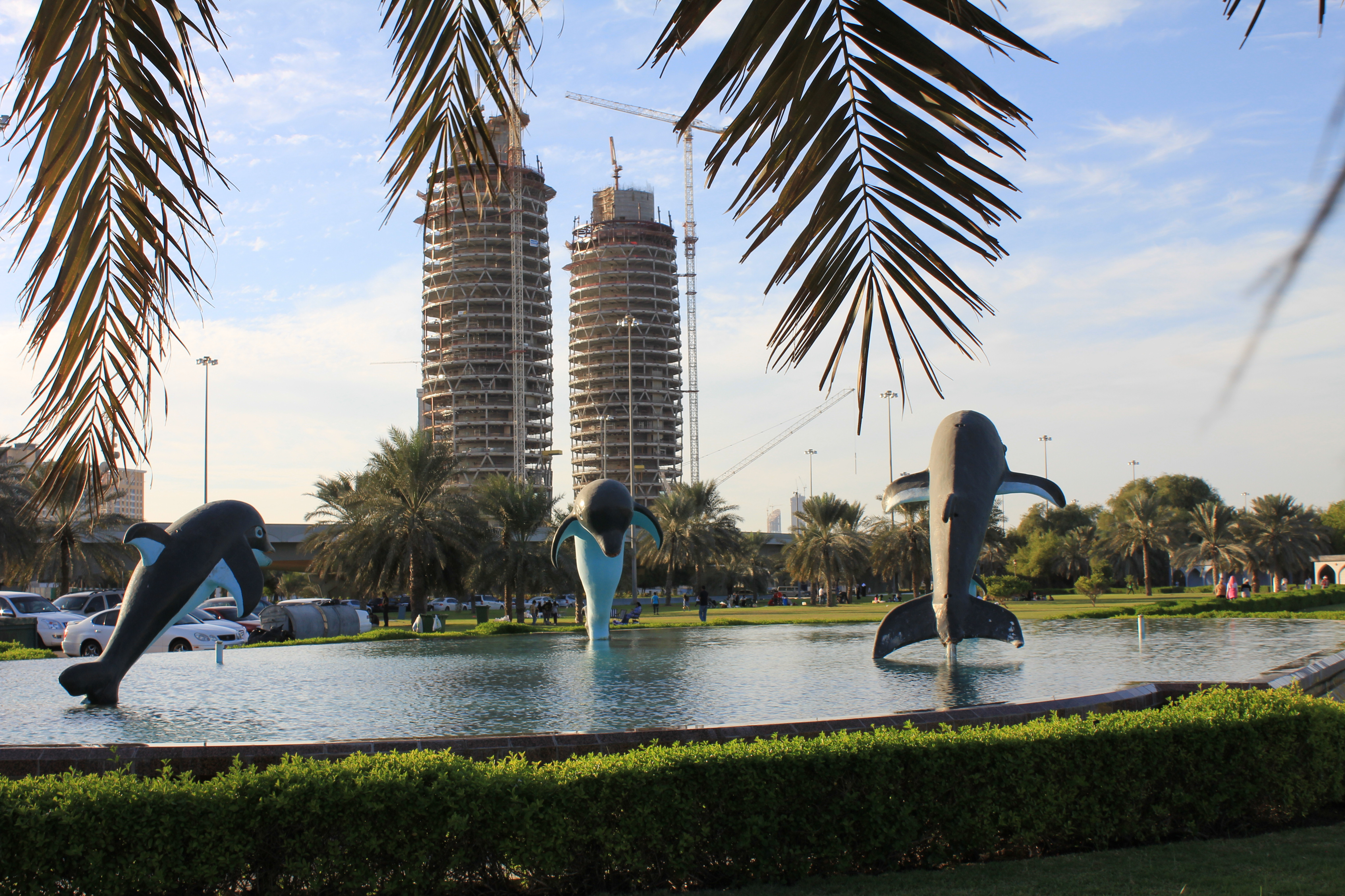 Fonutain